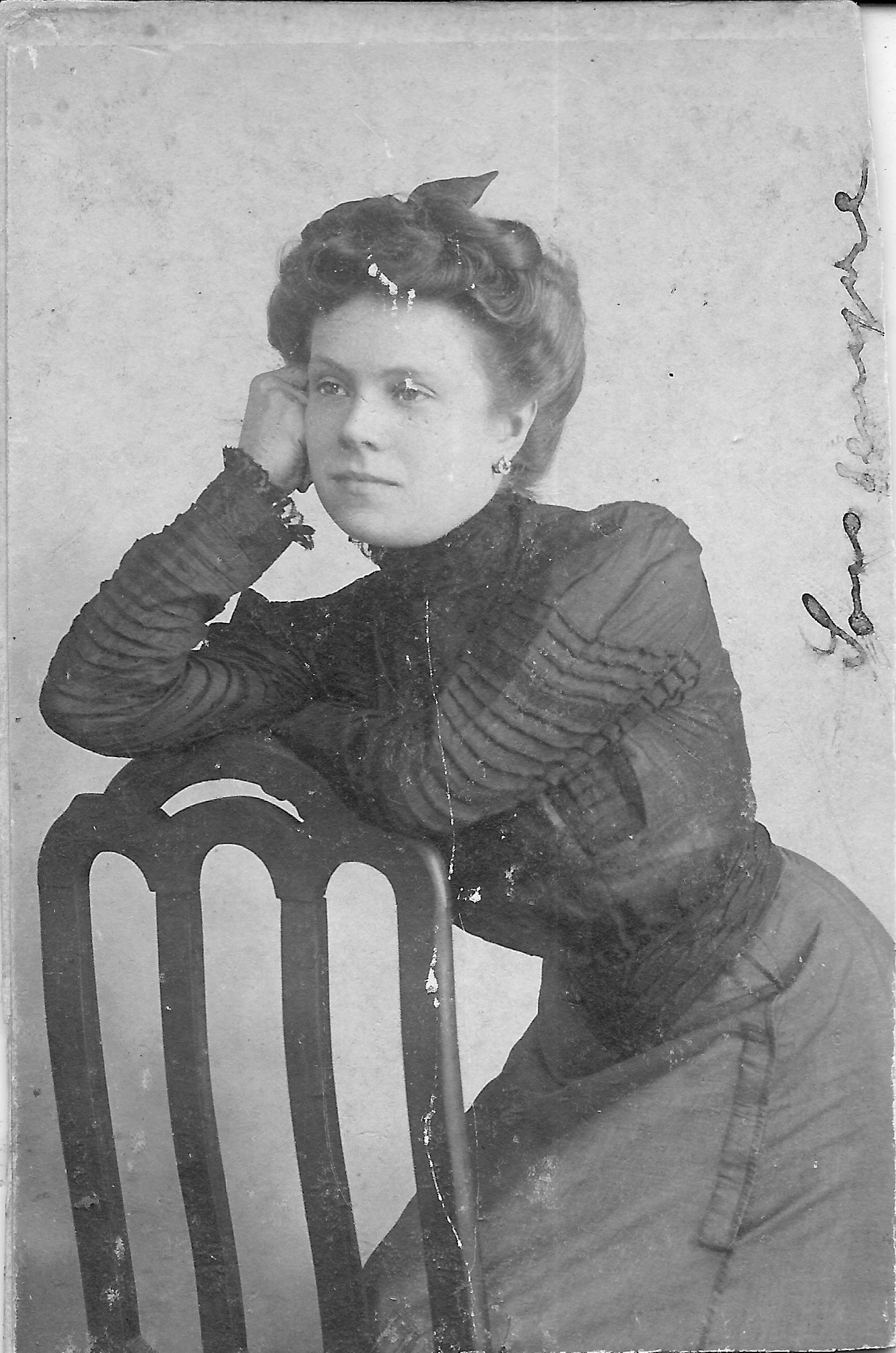 Foto di repertorio